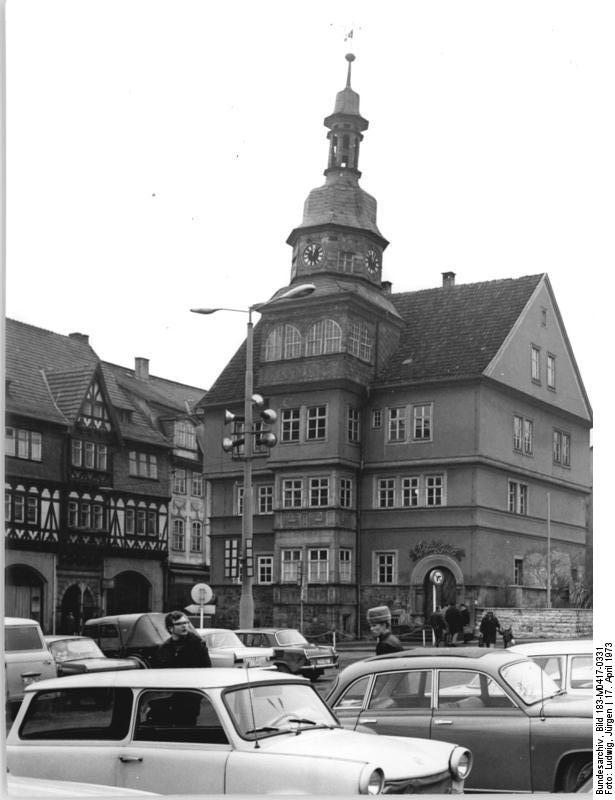 Eisenach, Rathaus, Ratsapotheke ADN-ZB Ludwig Bg-Schm 17.4.1973 Bez. Erfurt: Blick auf den Marktplatz von Eisenach, Mitte: Das Rathaus und links ein Teil der 1560 erbauten Ratsapotheke.